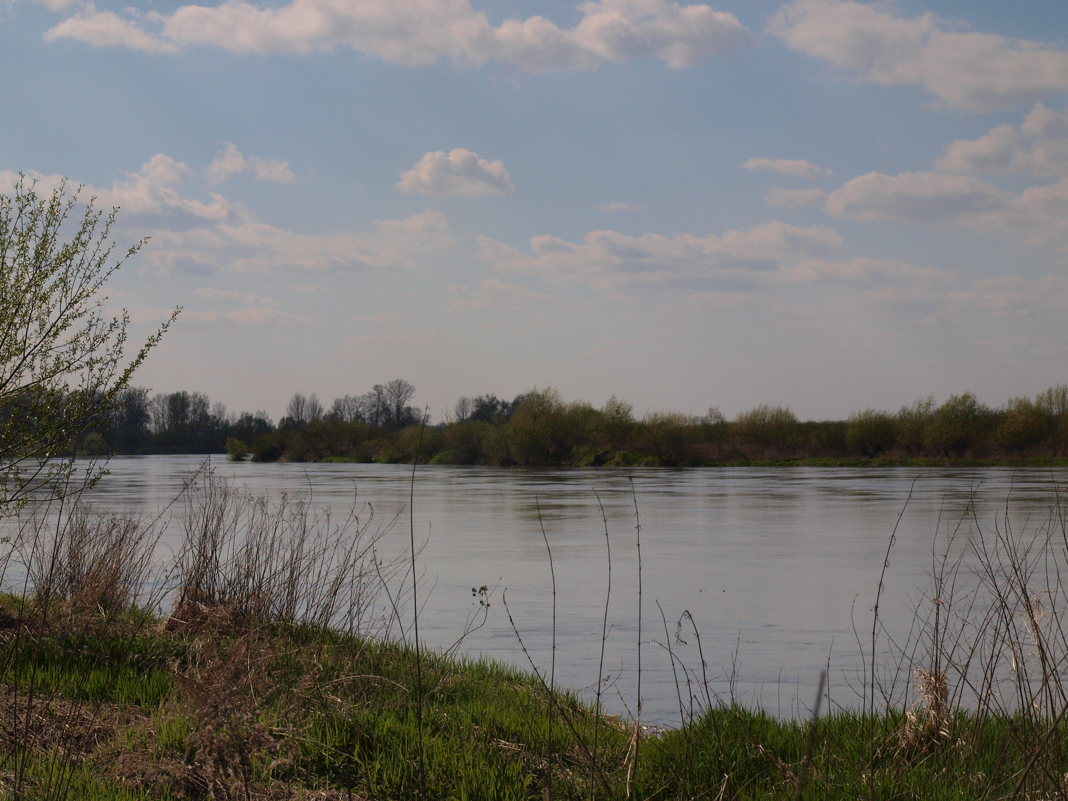 Samocice, Wisła w górę biegu